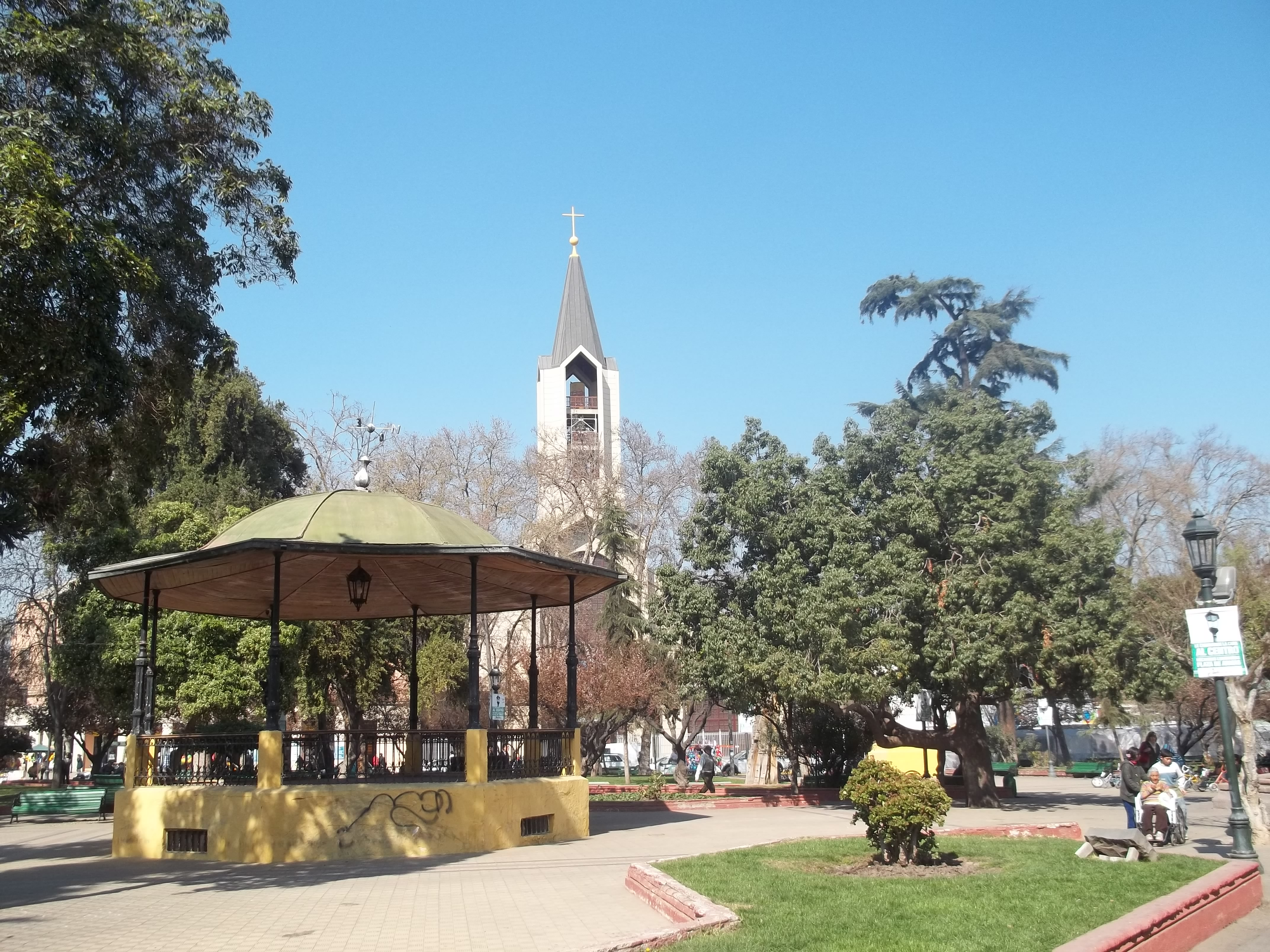 plaza de san bernardo 2012